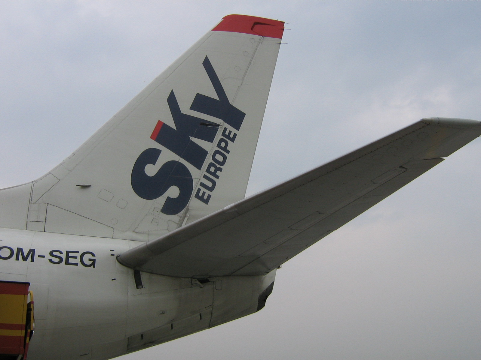 Eigen foto